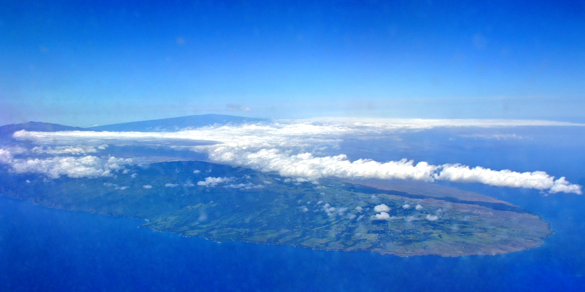 Иллюстрация для викиучебника Гавайеведение